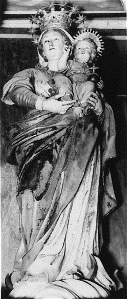 Immacolata Concezione - Legno policromo